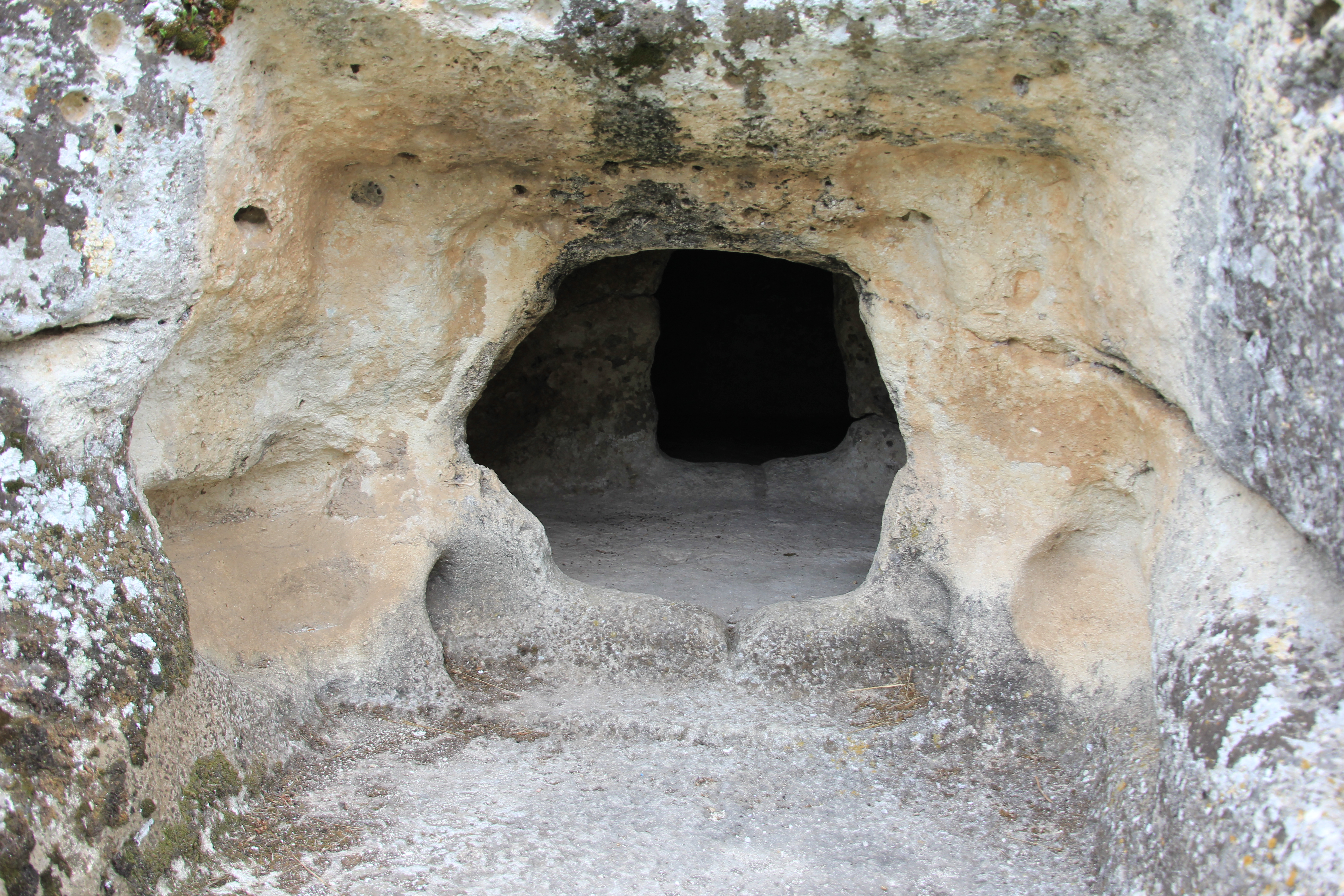 Villanova Monteleone, necropoli di Puttu Codinu